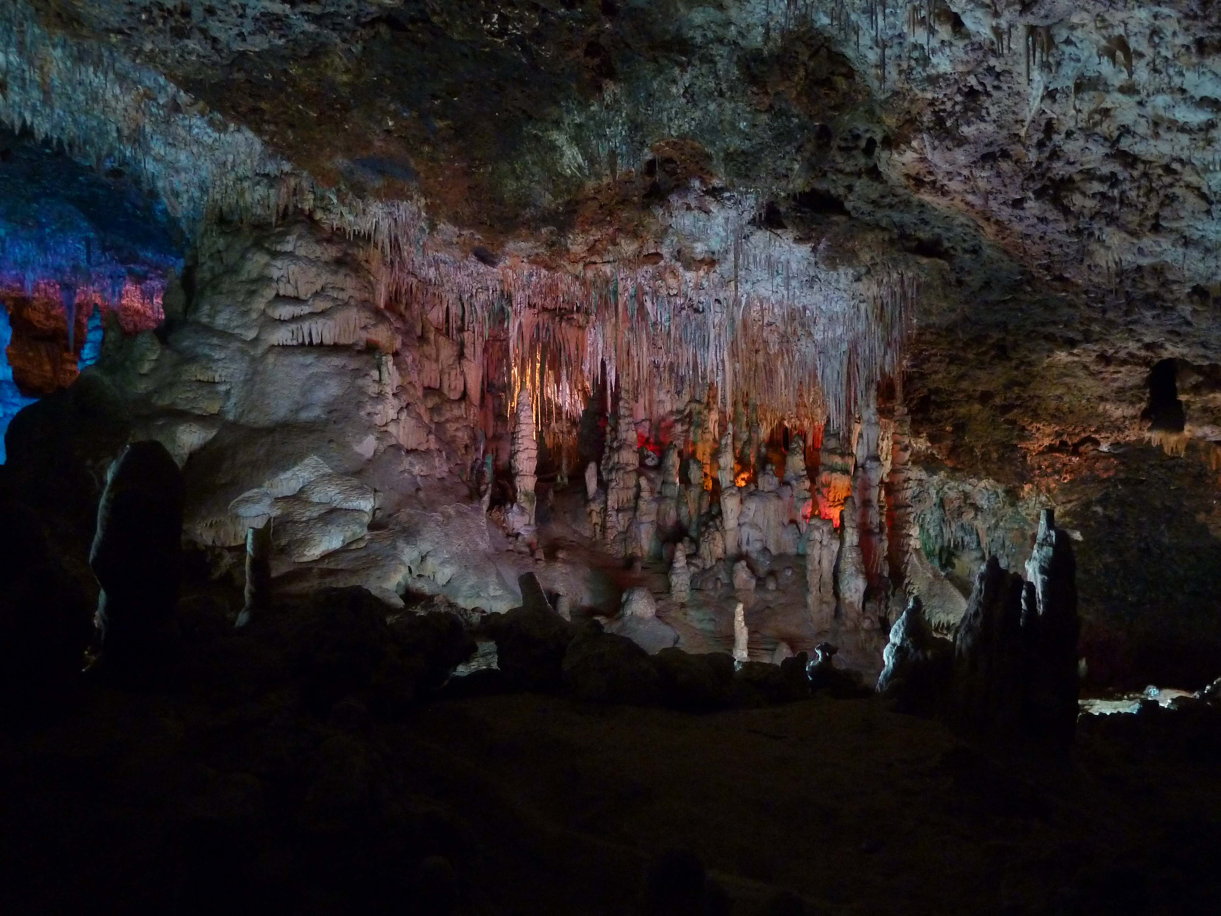 Stalagmiten und Stalaktiten am Beispiel der Drach-Höhle auf Mallorca